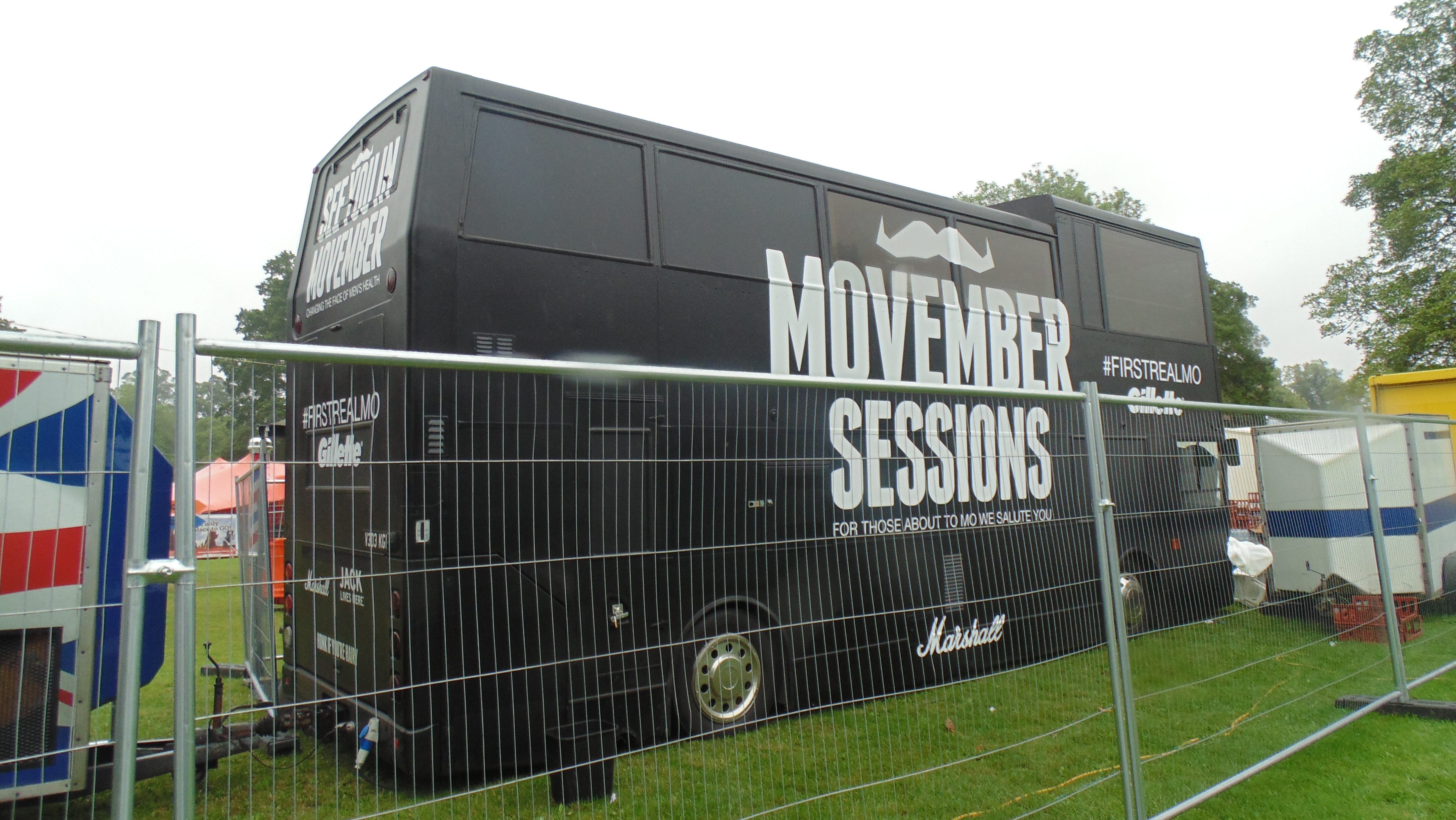 V303KGW